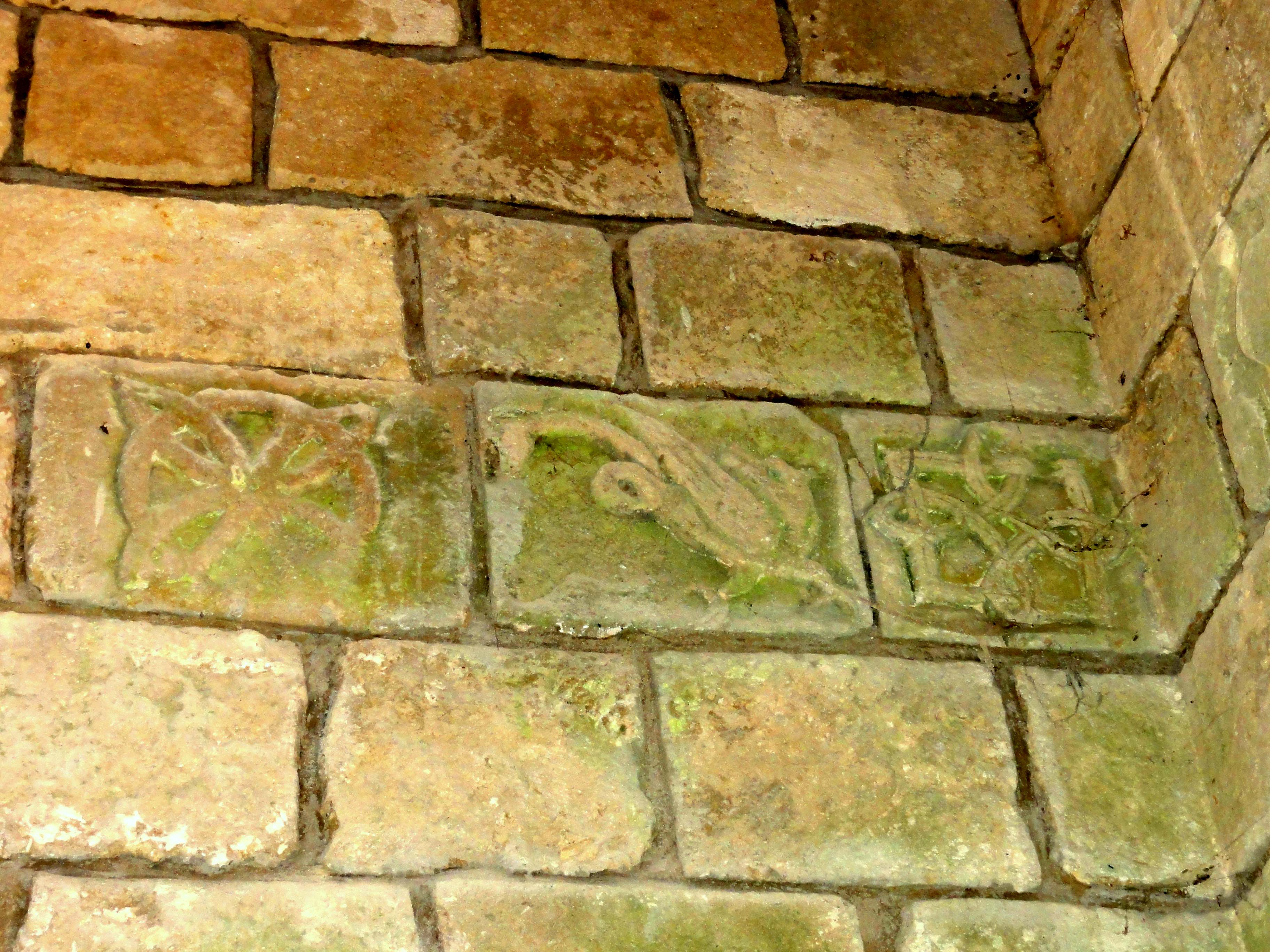 Intérieur de l'église - voir titre.